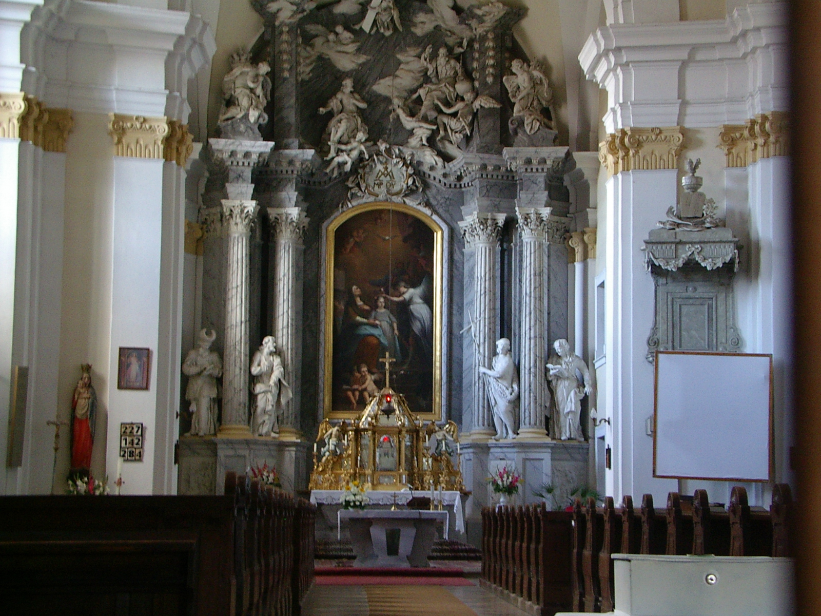 A piarista templom oltára